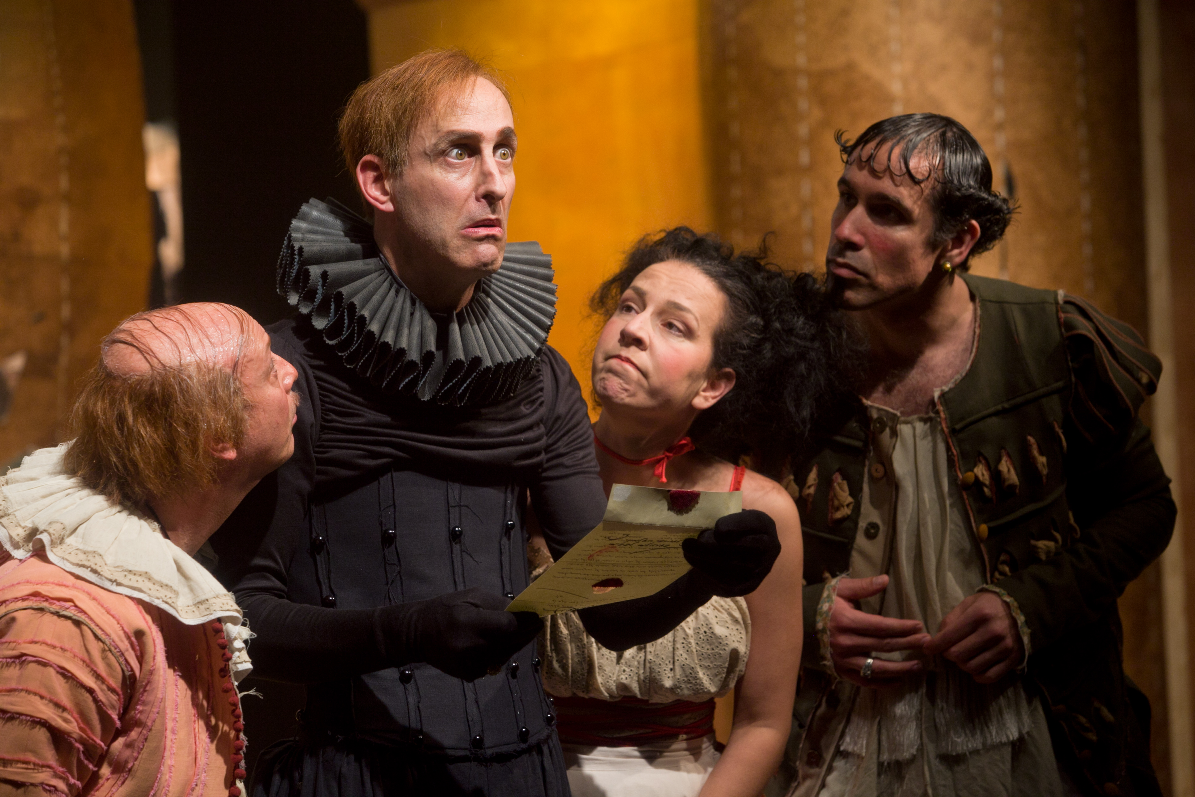 הלילה השנים עשר, תיאטרון החאן